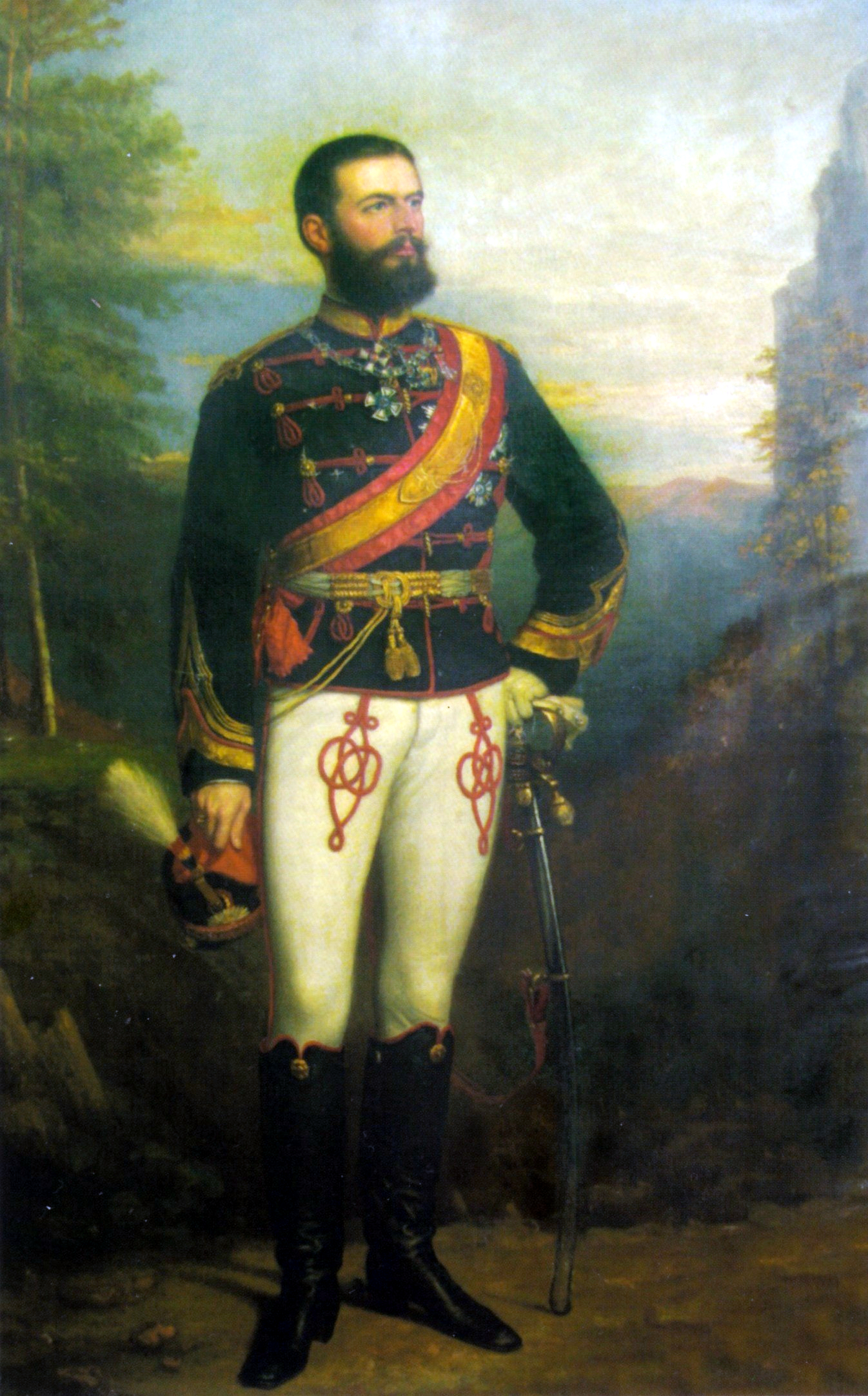 Principele Carol I în uniformă de cavalerie, ulei/pânză - Muzeul Național Peleș din Sinaia - România